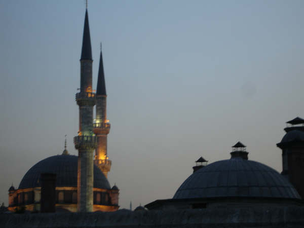 Bu fotoğraf şahsım tarafından çekilmiştir